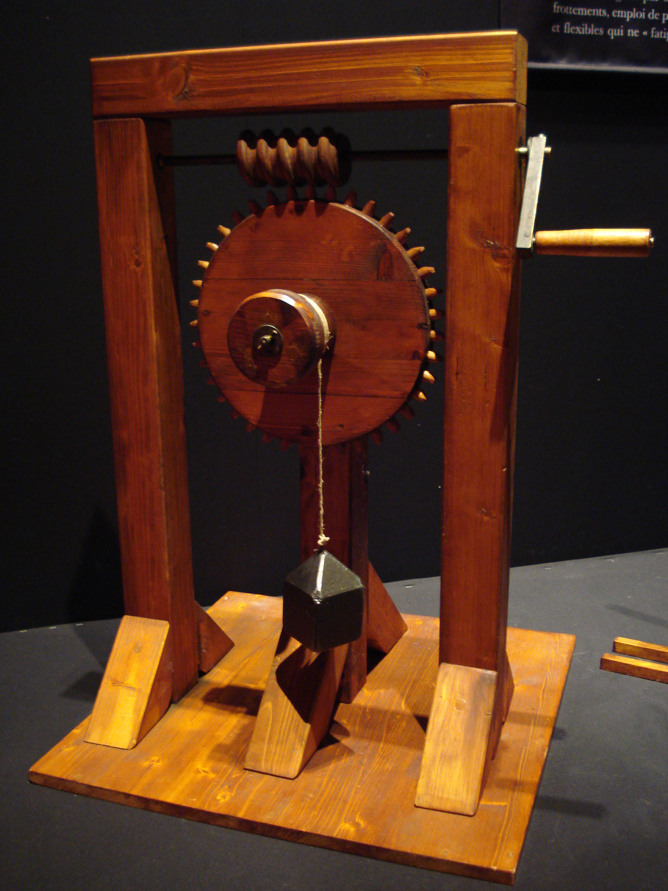 Maqueta realizada a partir de un mecanismo dibujado por Leonardo da Vinci (Codex Madrid I, f.17 a.). La máquina se basa en un engranaje helicoidal.